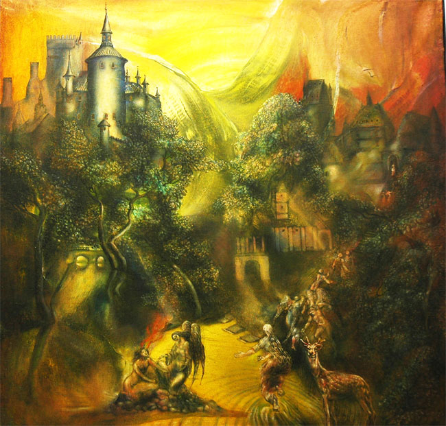 Владимир Лисунов, "Астральный туман", 1993. Холст, масло, 99х99.